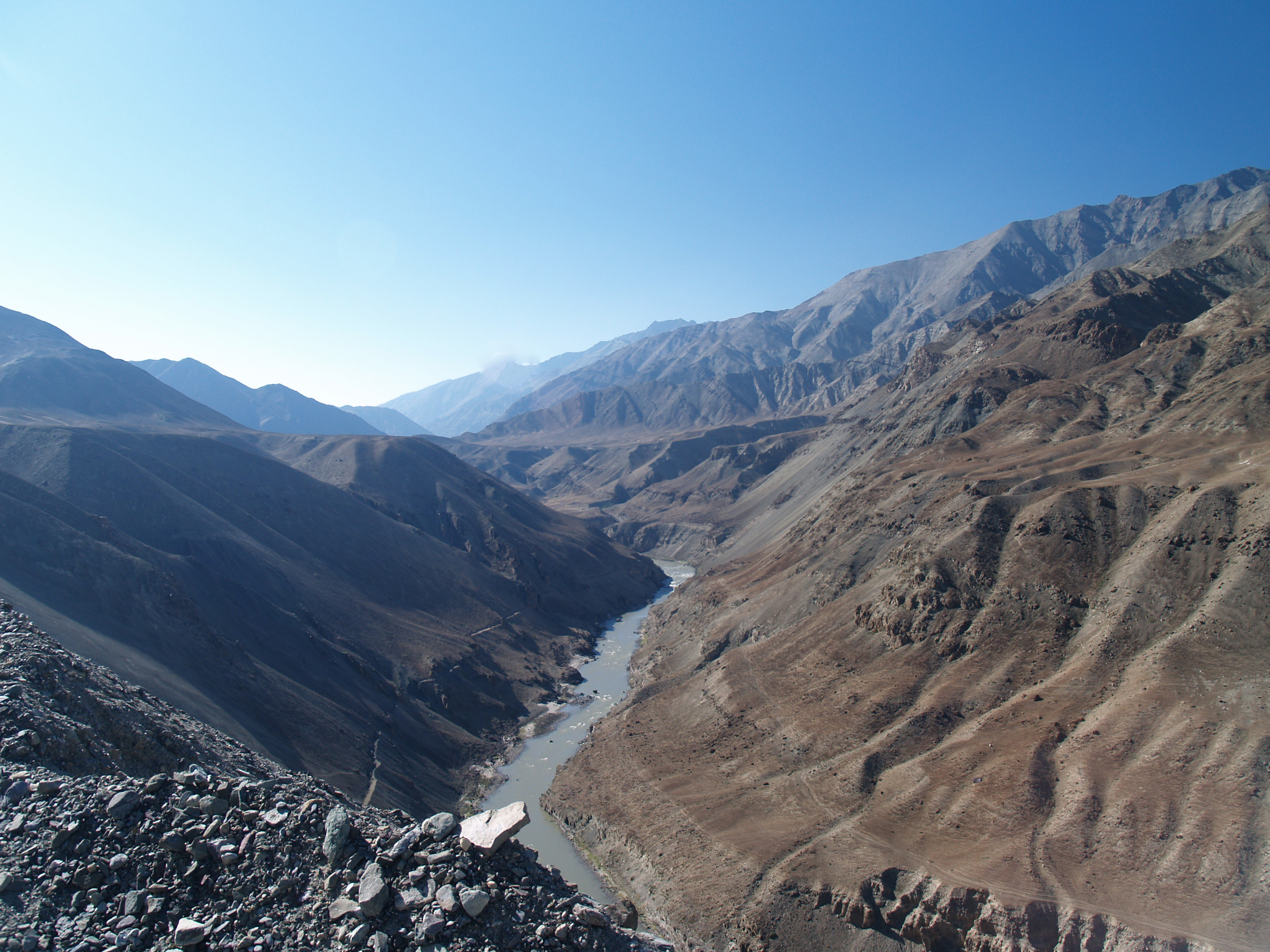 Canyon in Ladakh